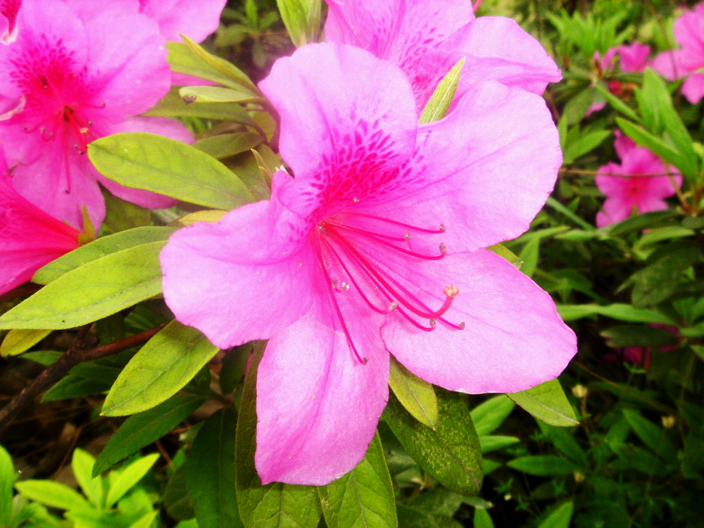 Azalea taken in Xuanwu Lake, Nanjing, China